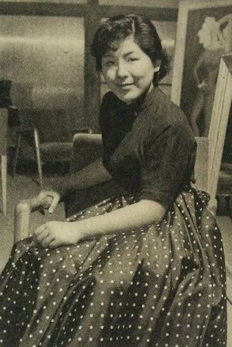 東郷たまみ（二科会会長。東郷青児の娘）